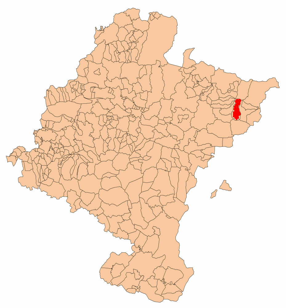 Origen: es::Commons:Image:Navarra - Mapa municipal.svg